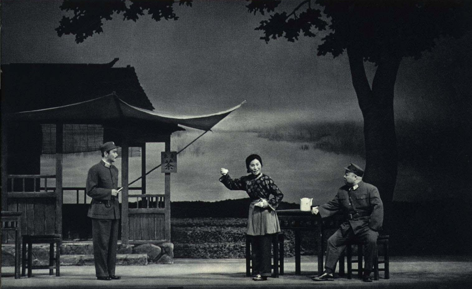 1967-08 1967年 沙家浜